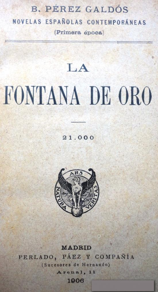 Portada de La Fontana de Oro, novela de 1871 de Benito Pérez Galdós.